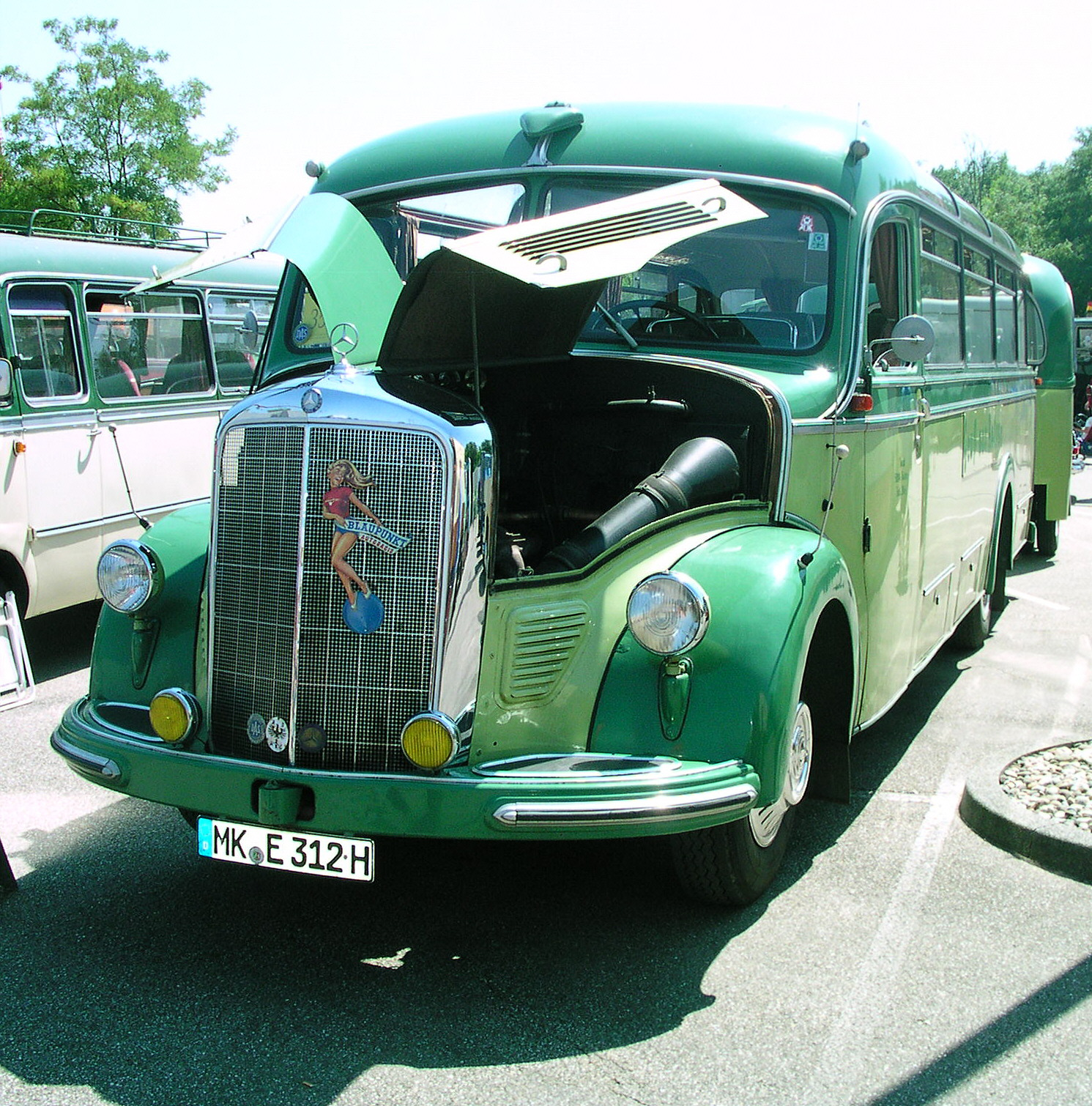 Oldtimer-Treffen bei Daimler-Chrysler in Wörth am Rhein. Mercedes O 3500, Baujahr 1953, Motor OM 315, Hubraum 4500 cm³, 73 kW (100 PS), bei 3000 U/min, Länge 8,65 m, Breite 2,42 m, Höhe 2,80 m, 29 Sitzplätze mit Personenanhänger der Gottfrid Lindner AG Ammendorf, Baujahr 1942, Länge 5,80 m, Gesamtgewicht 6 t, 24 Sitz- und 14 Stehplätze.